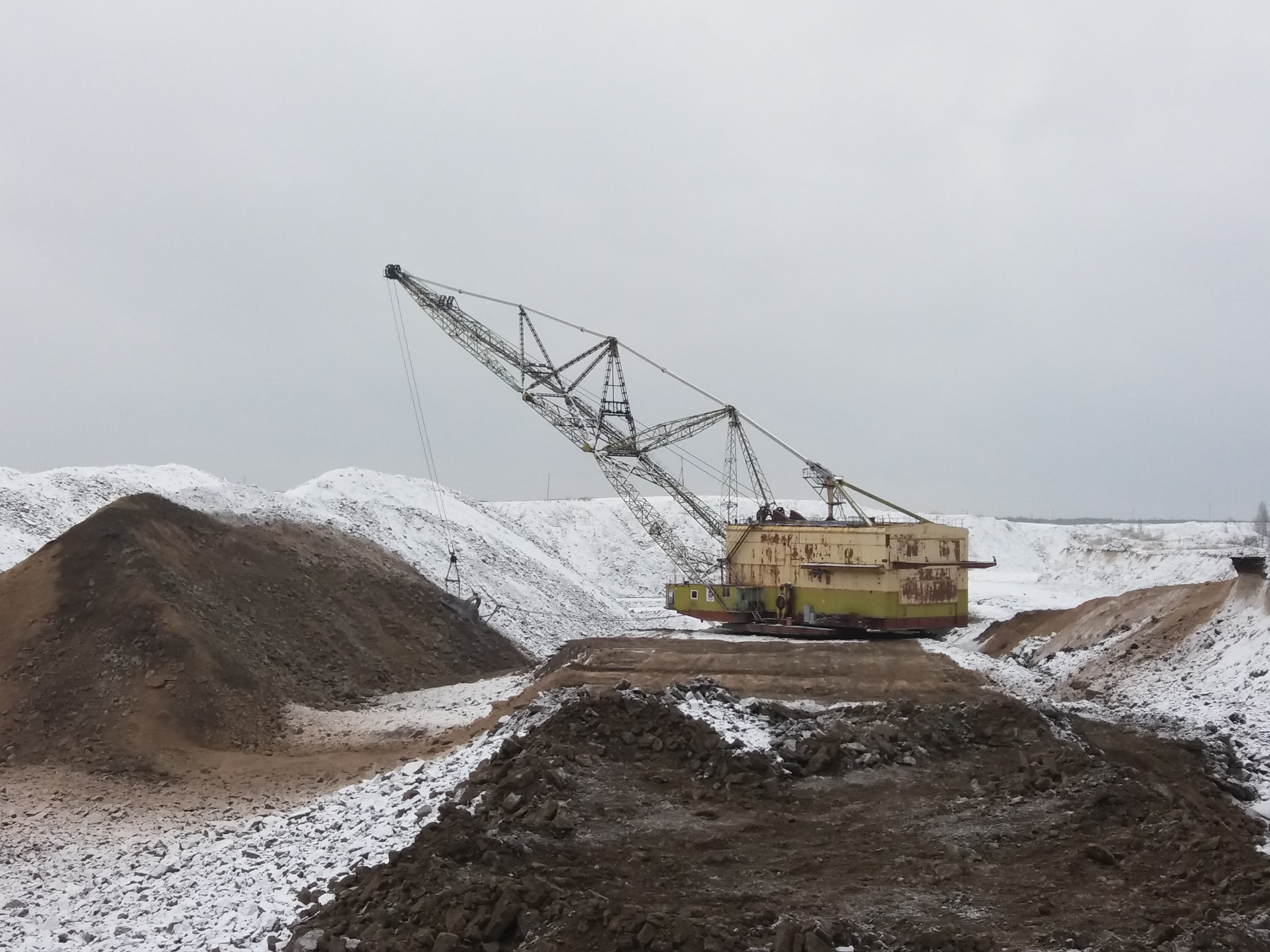 Viivikonna karjäär